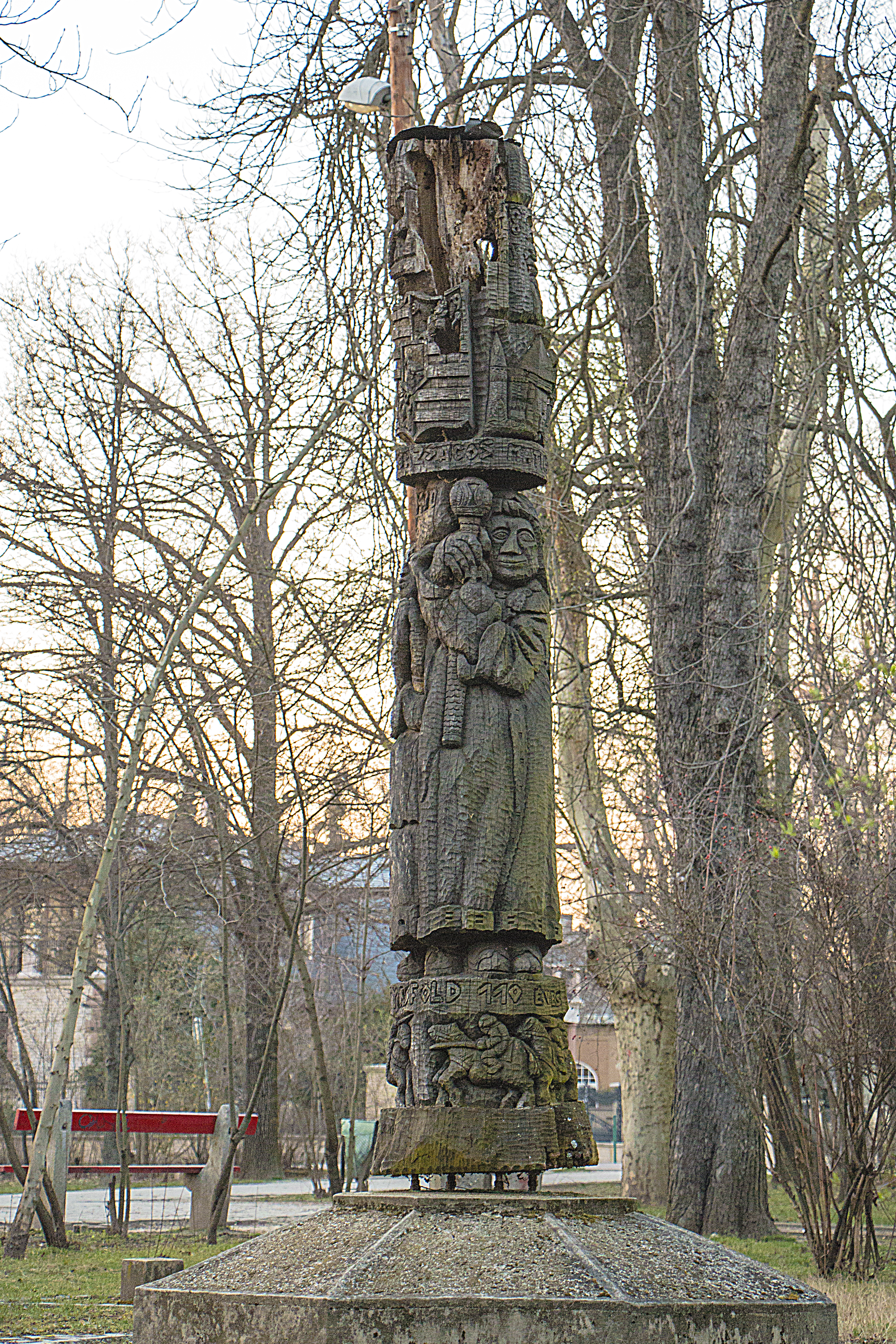 Koncz Vilmos fafaragó alkotása Mátyásföldön. Az 1997-ben avatott emlékoszlop Mátyásföld 110-ik évfordulójára (1987-ben alakult a nyaralóövezet) készült.